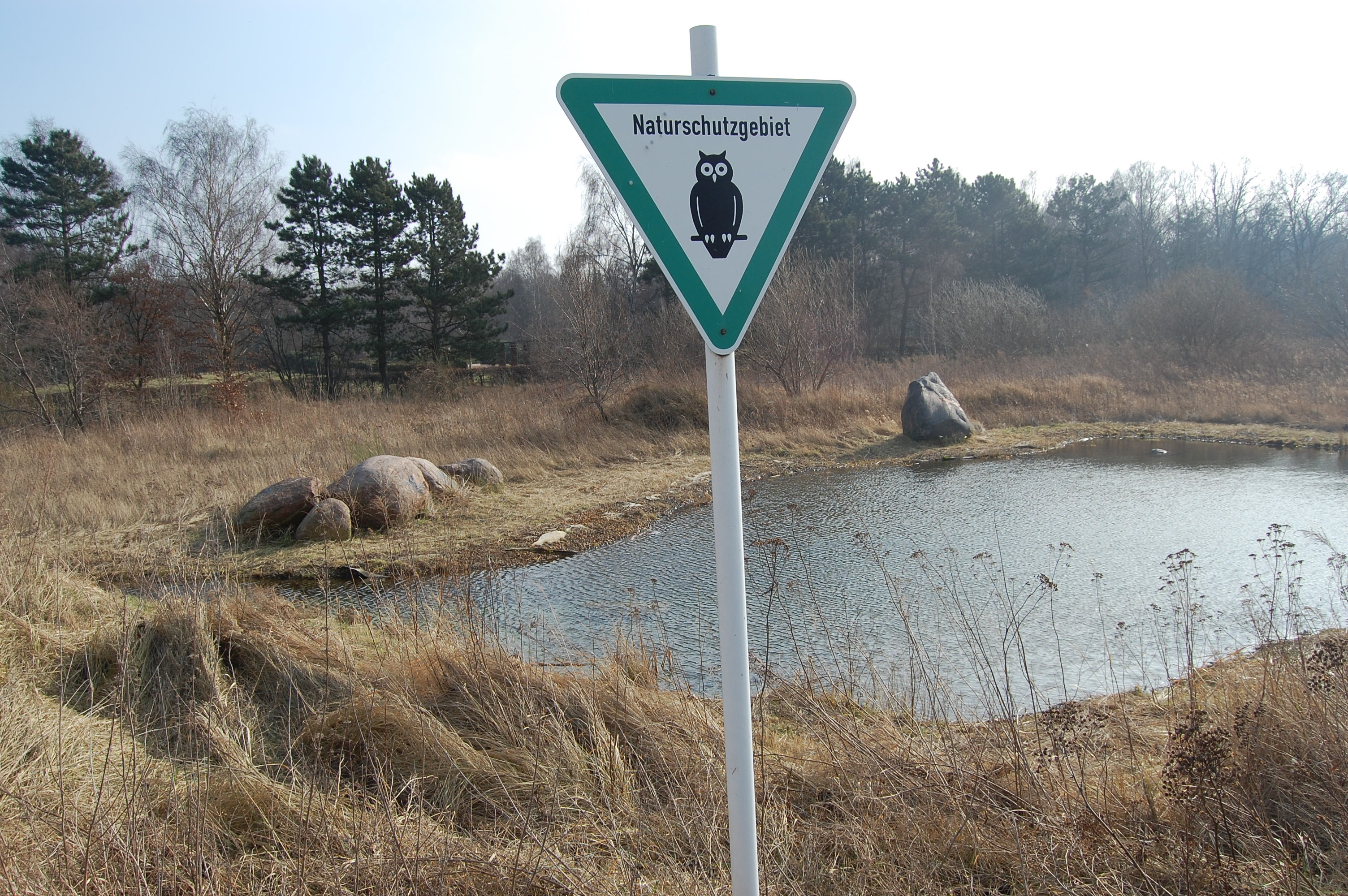 NSG Unkenpfuhle Marzahn, Berlin